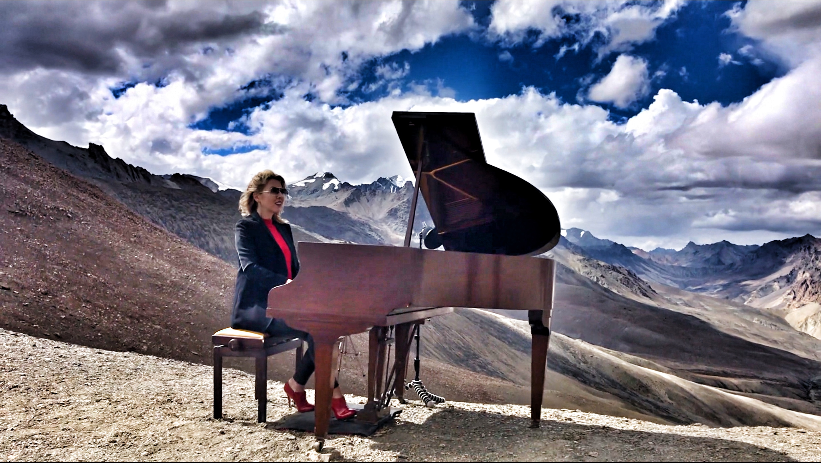 Эвелина Де Лэйн играет в Гималаях, устанавливая Мировой Рекорд